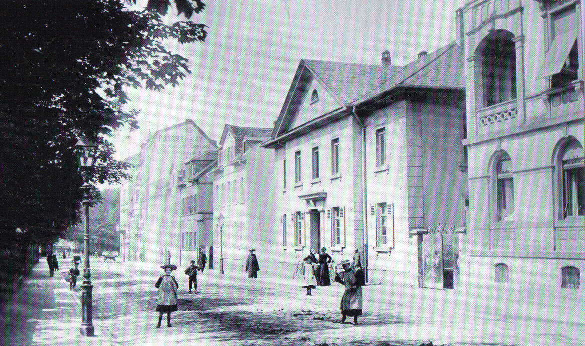 Frankfurt-Bockenheim, Blick vom Haus Kurfürstenstraße 4 mit Loggien, Fenstergebiel und Fenstergewändern, daneben das kurhessische Amthaus Nr. 6 von 1837 mit Mittelrisalit, auffallendem Frontispiz und Türportal bis zum Gebäude mit der Stern-Apotheke Kurfürstenstraße 22/ Ecke Große Seestraße, davor Mehrfamilienhaus mit Wandreklame der Firma Ratazzi & May im Hinterhof. Am Ende der Straße kann man den Kurfürstenplatz mit Teilen des Brunnenfundamentes erkennen. Foto von 1905.